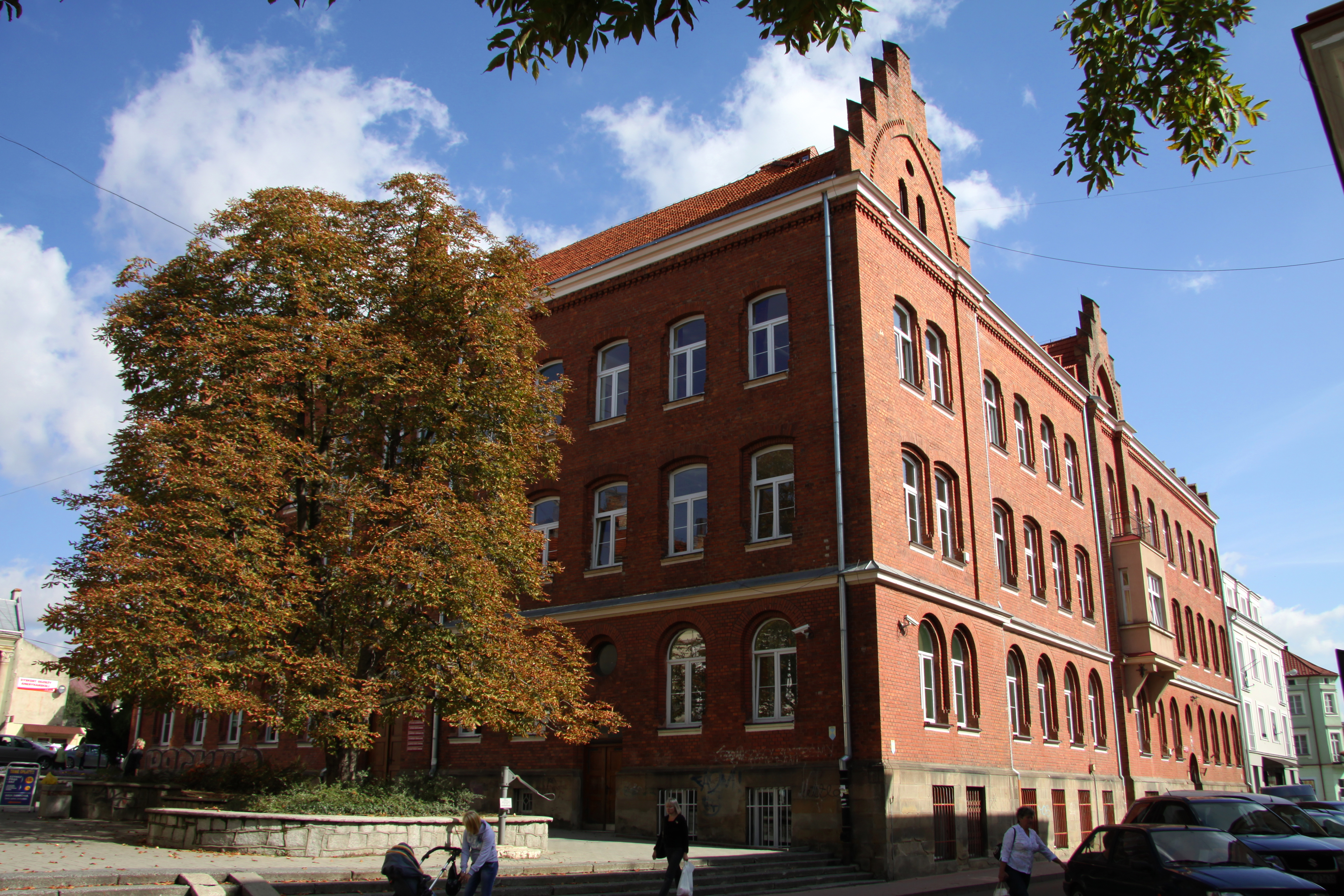 Dawna "Szkoła Wydziałowa Męska", ul. Sokoła 6, 1906, internat